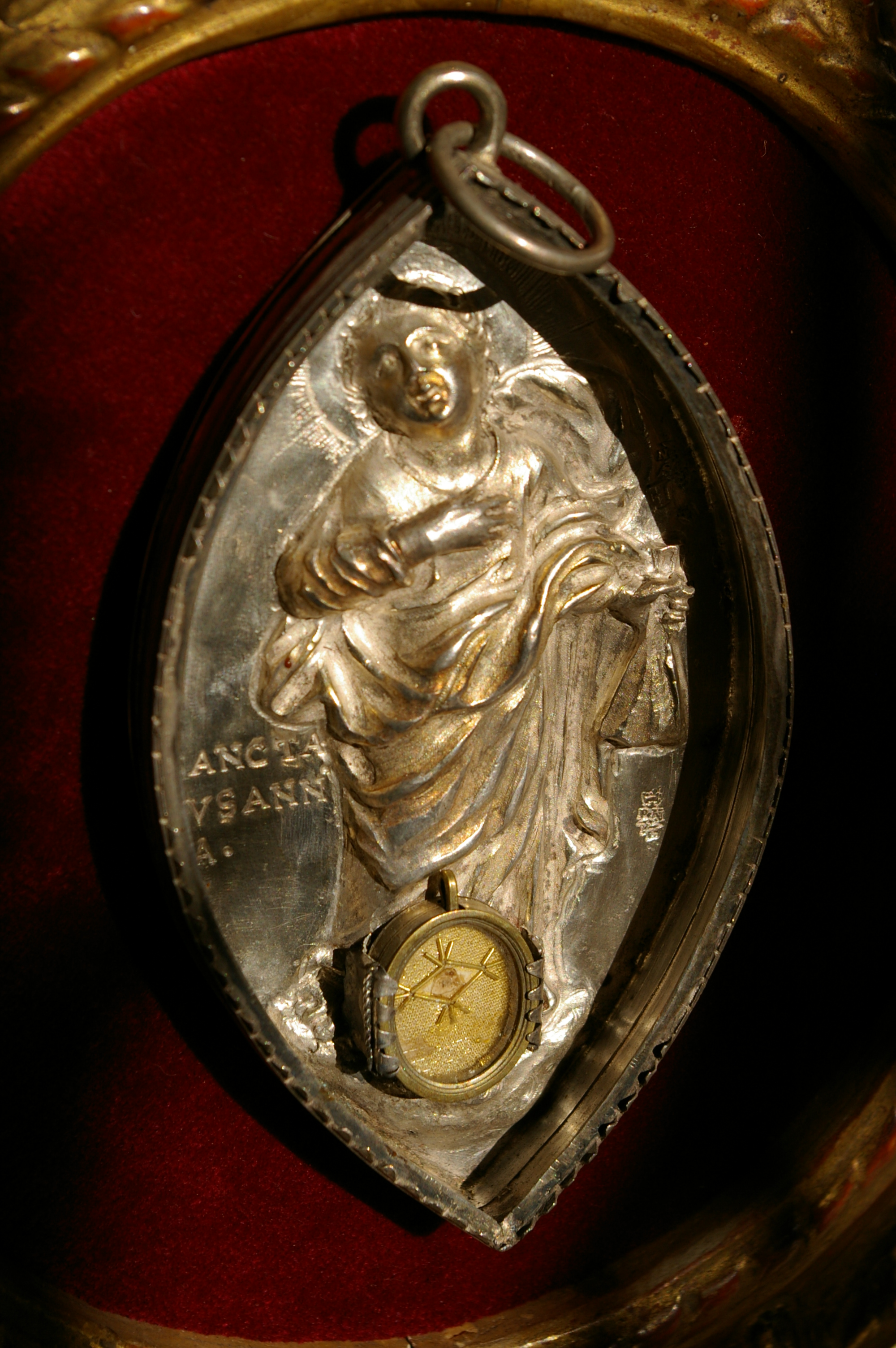 Reliques de sainte-Suzanne (église de Sainte-Suzanne (Mayenne)